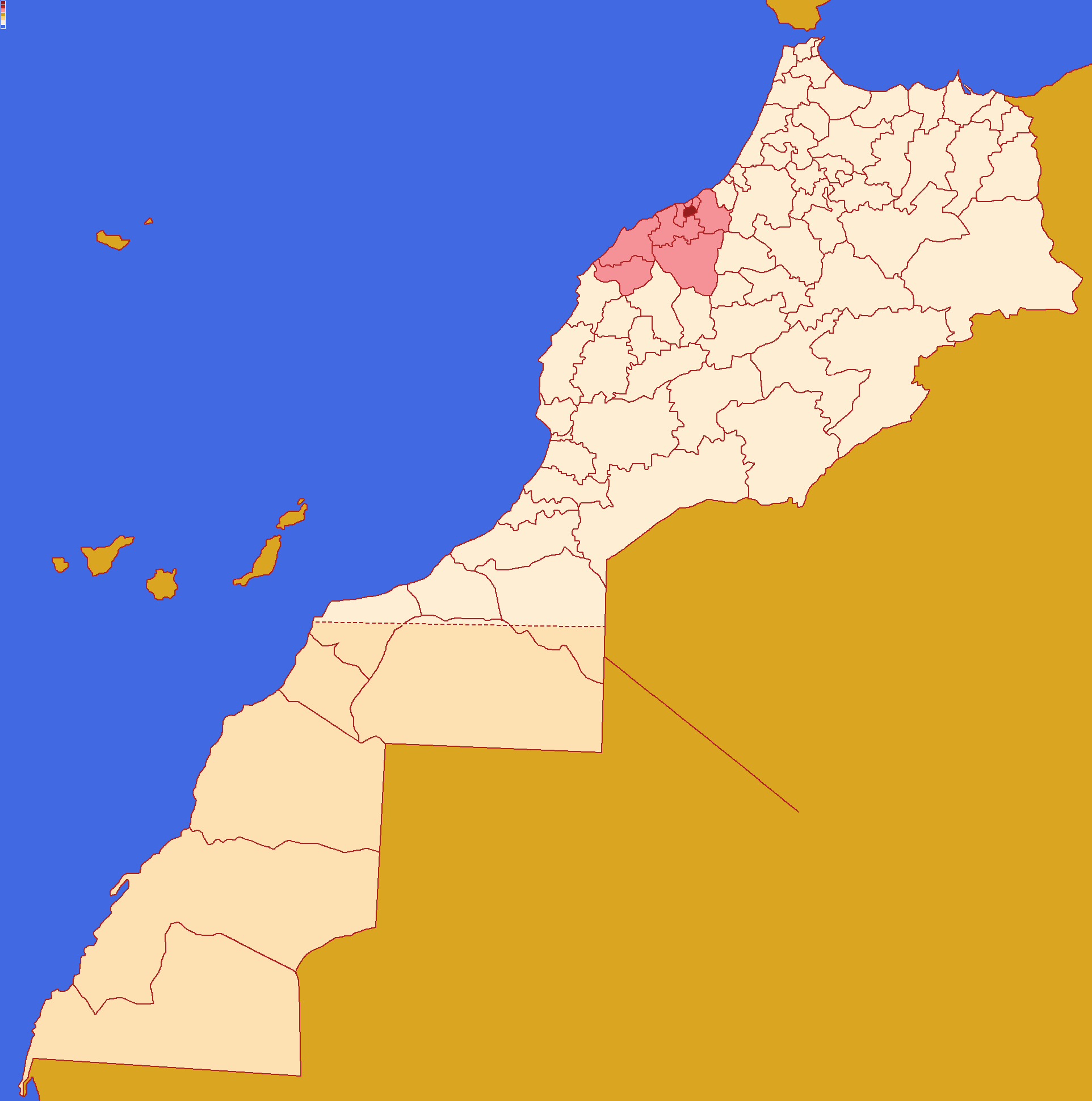 Localização da província de Médiouna , dentro da região de Casablanca-Settat e dentro de Marrocos. Conforme a reforma administrativa de 2020.